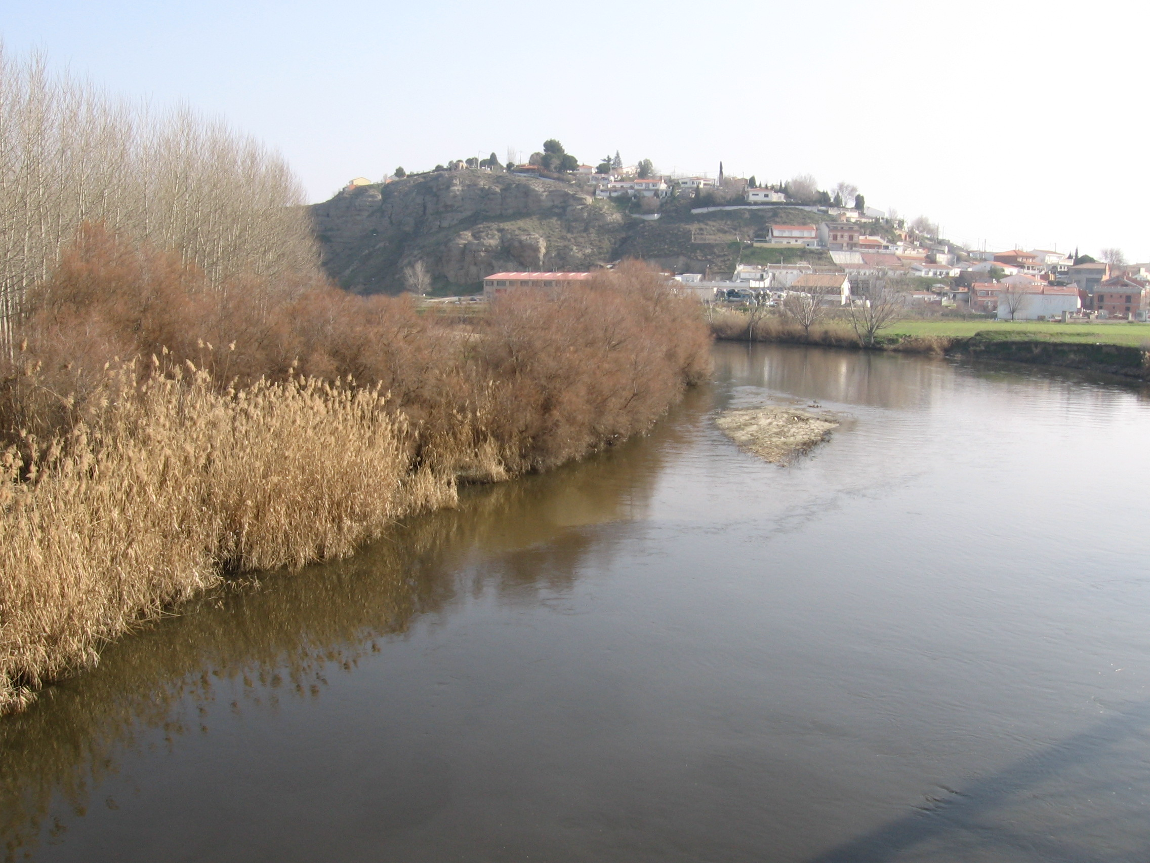 Río Jara a su paso por Titulcia (Madrid). Foto realizada desde el puente viejo.